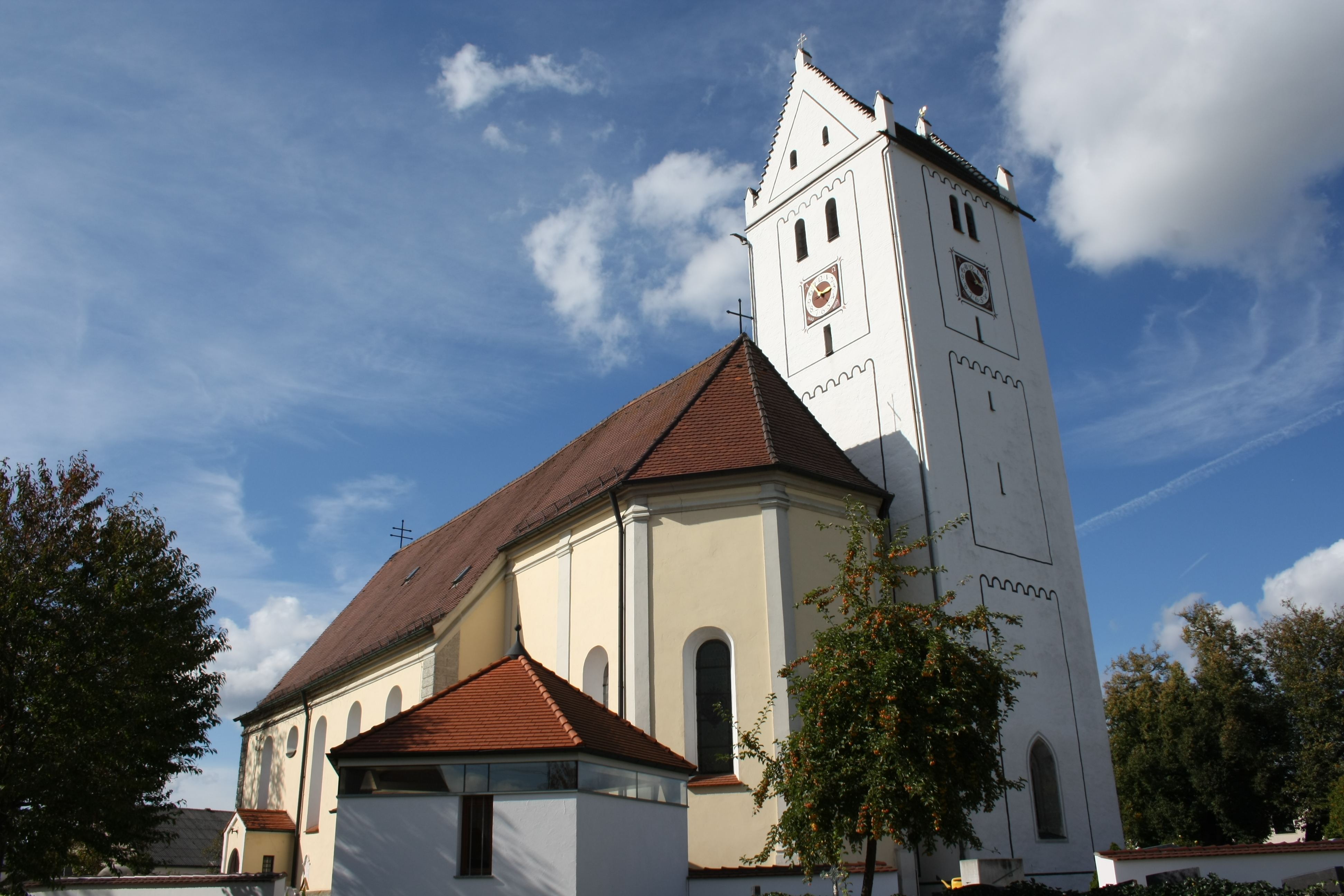 Katholische Pfarrkirche St. Martin in Mörslingen im Landkreis Dillingen an der Donau